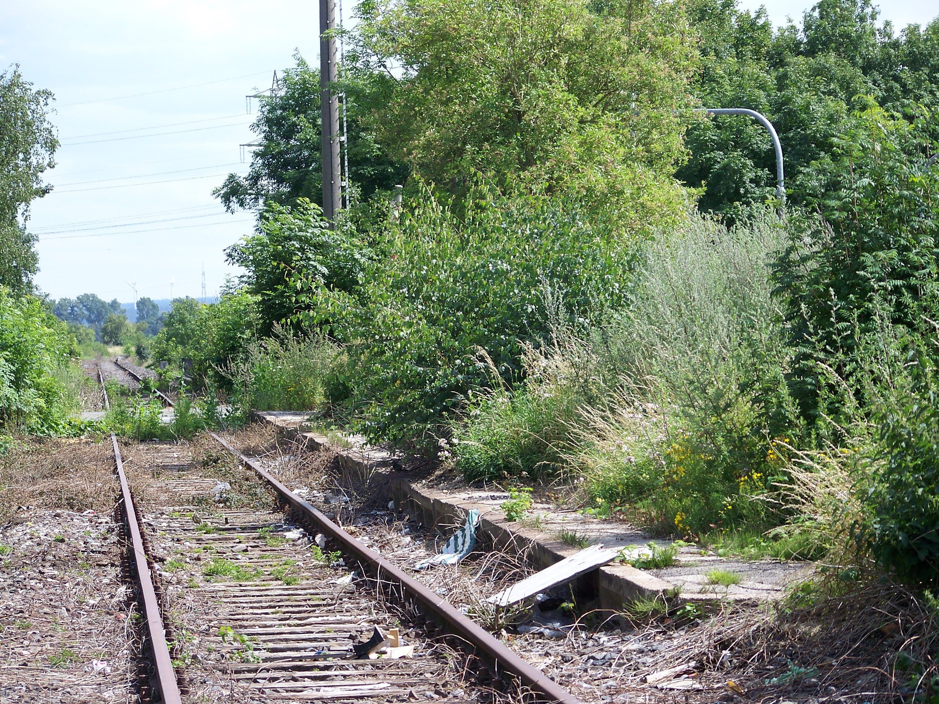 Foto des ehemaligen Haltepunktes Begau auf der Bahnstrecke Herzogenrath—Alsdorf—Stolberg bei Streckenkilometer 9,1/9,2 - Blickrichtung St.Jöris/Stolberg.